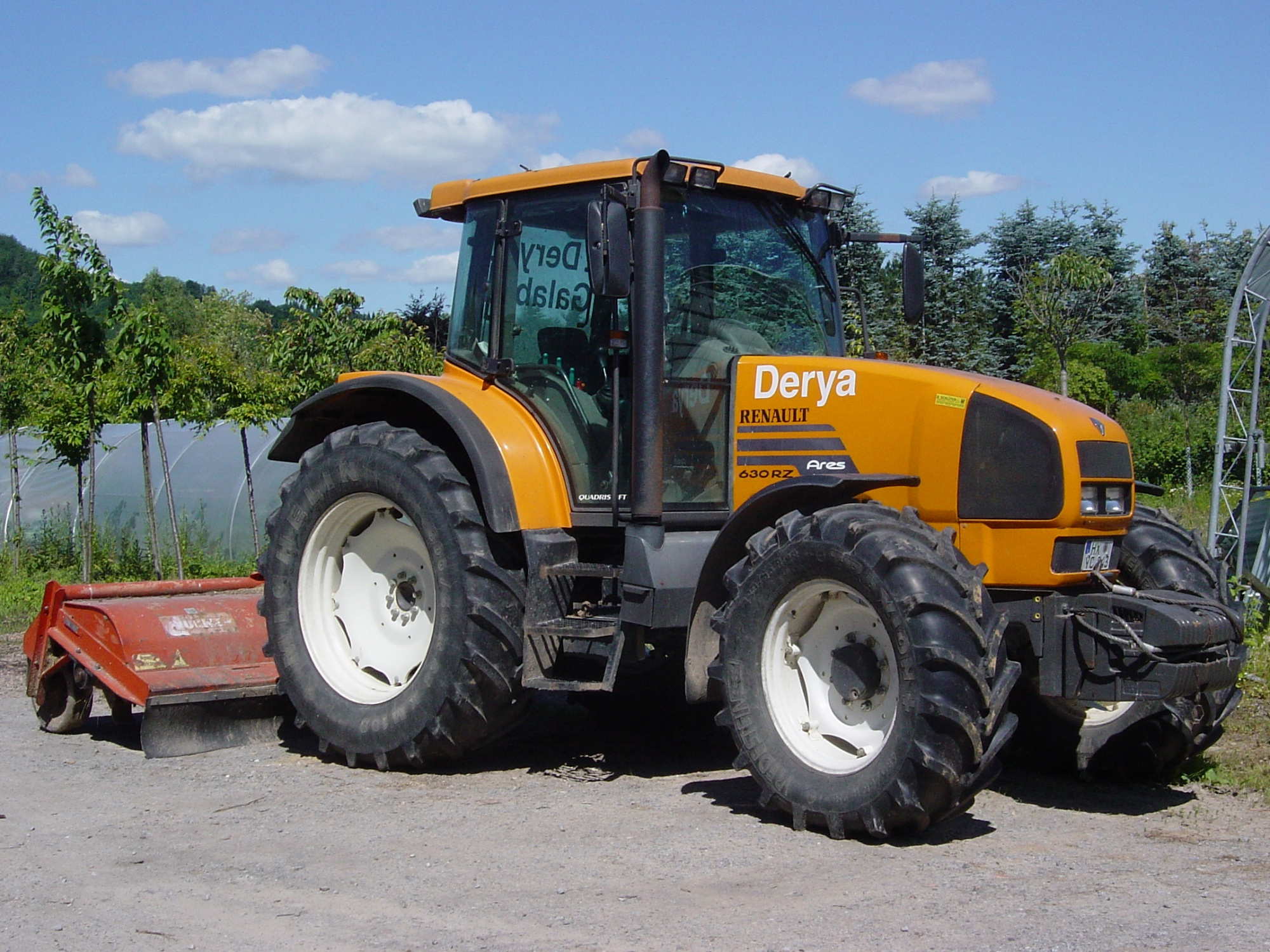 Renault Ares 630 RZ